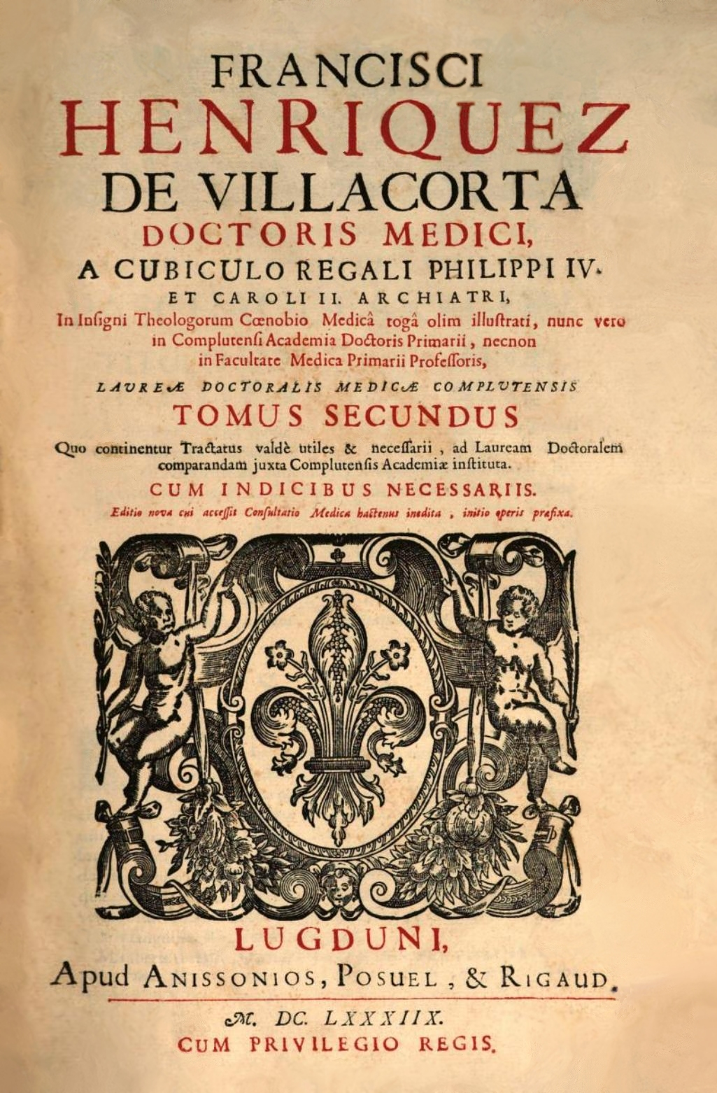 Francisco Enríquez de Villacorta. Doctor laureado en medicina por la Universidad de Alcalá (tomo II). Lyon: Apud Anissonios, Posuel & Rigaud; 1688.